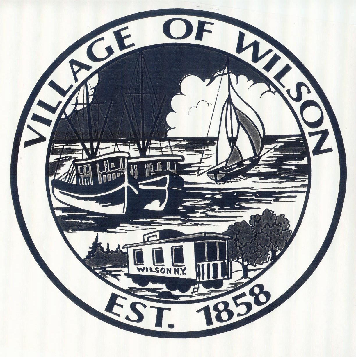 seal